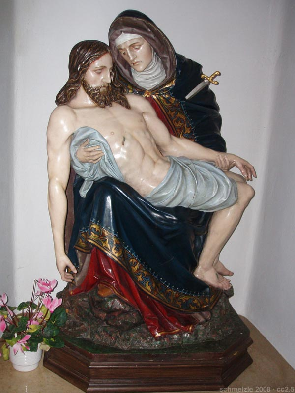 Katholische Kirche St. Georg in Siegelsbach, Pieta